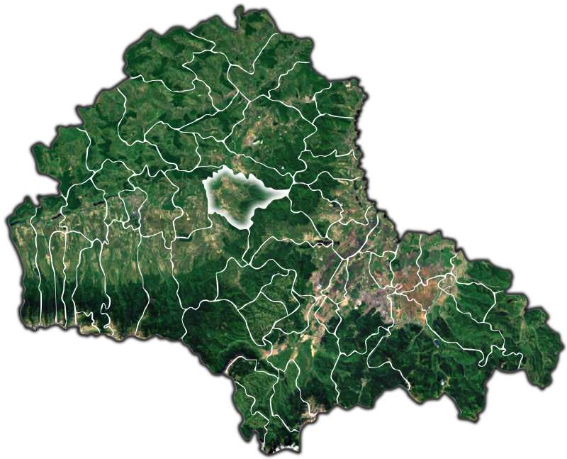 Parau jud Brasov